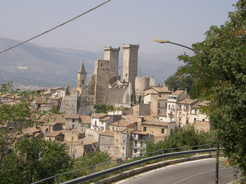 Pacentro